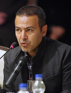 فریبرز عرب نیا در مراسم تجلیل از عوامل سریال مختارنامه